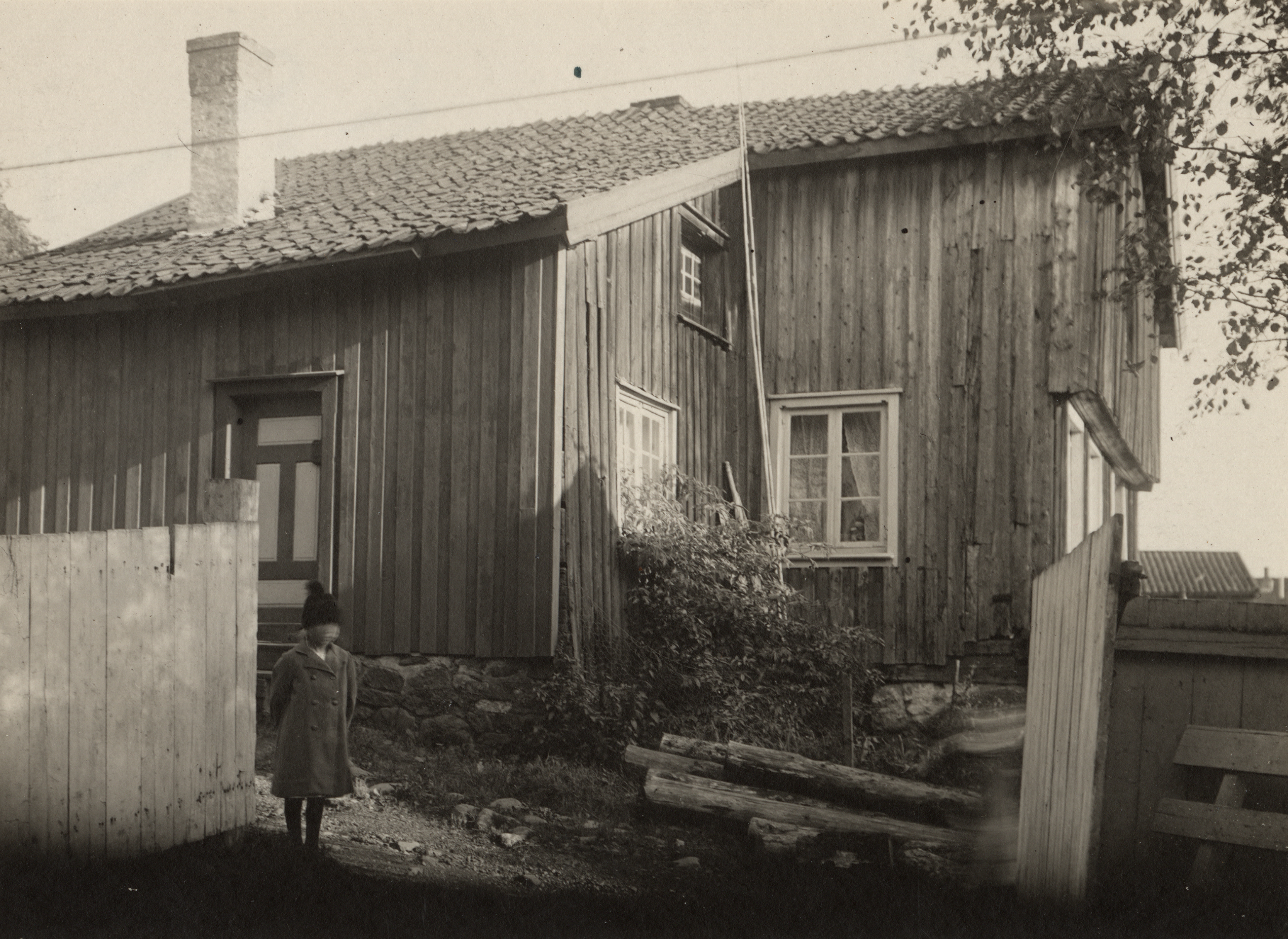 Bentegården i Tønsberg, Vestfold